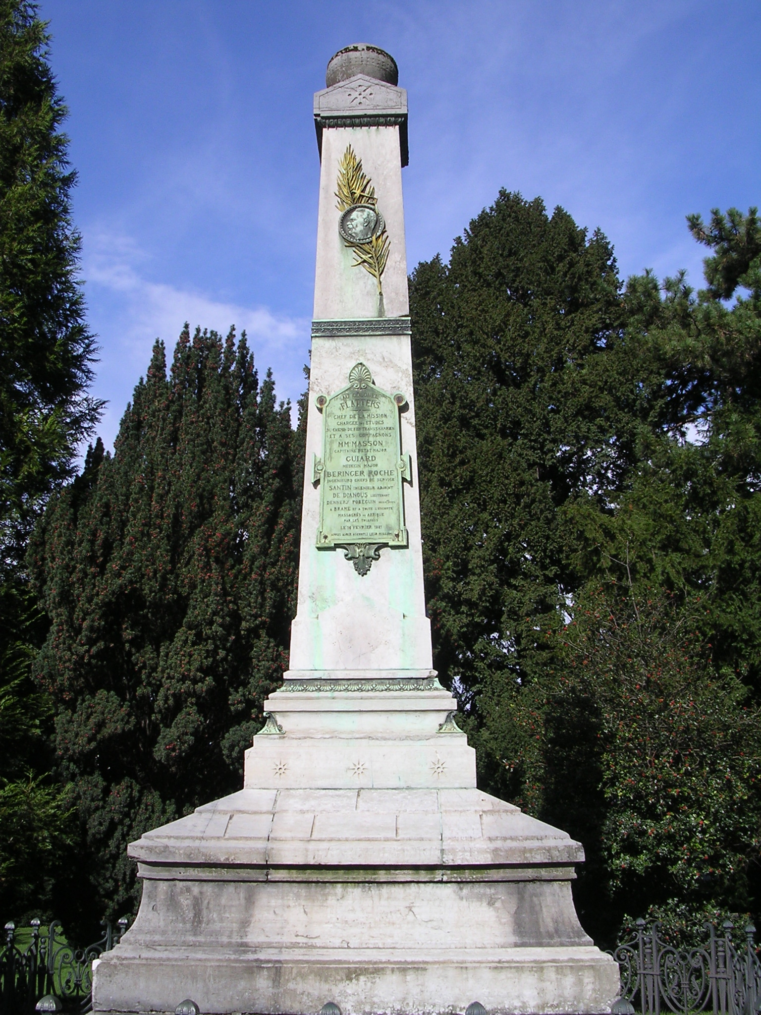 Monument à la mission Flatters au parc Montsouris, Paris, France.